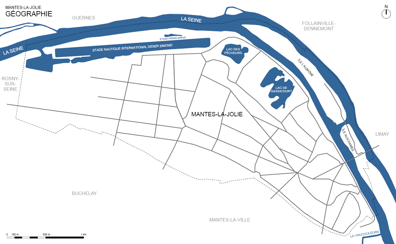 Géographie, Mantes-la-Jolie